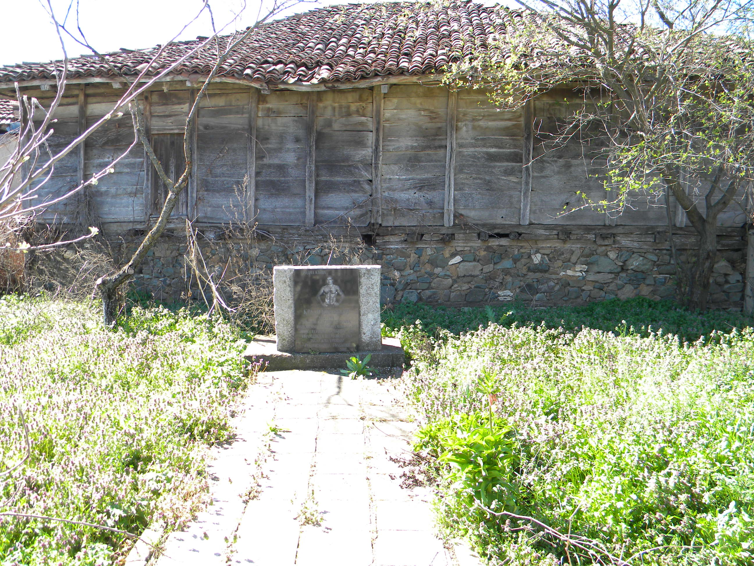 Родната къща на Крали Бимбалов, български състезател по борба класически стил с бронзов олимпийски медал, 1960 година.